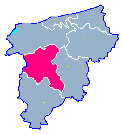 Locator maps for communes in województwo zachodniopomorskie : Siemyśl gm.png (podział na gminy)